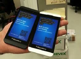 PODEMOS OBSERVAR DOS COLORES